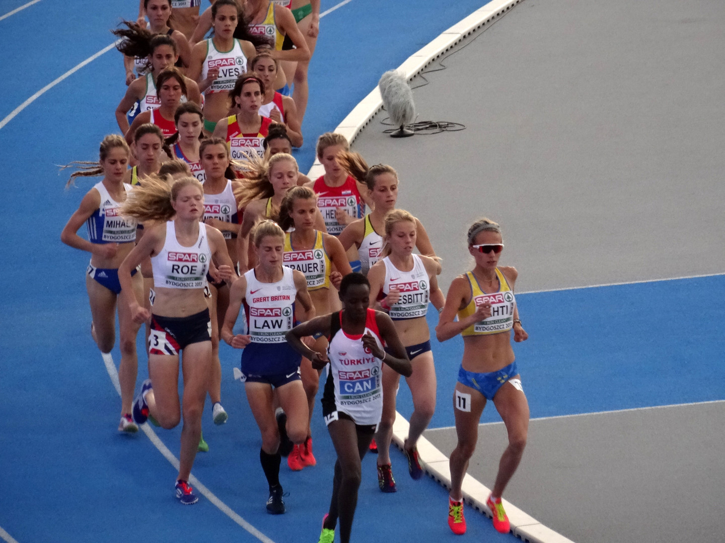 Młodzieżowe Mistrzostwa Europy w Lekkoatletyce U23 w Bydgoszczy 13-16 lipca 2017, finał biegu na 10000 m kobiet